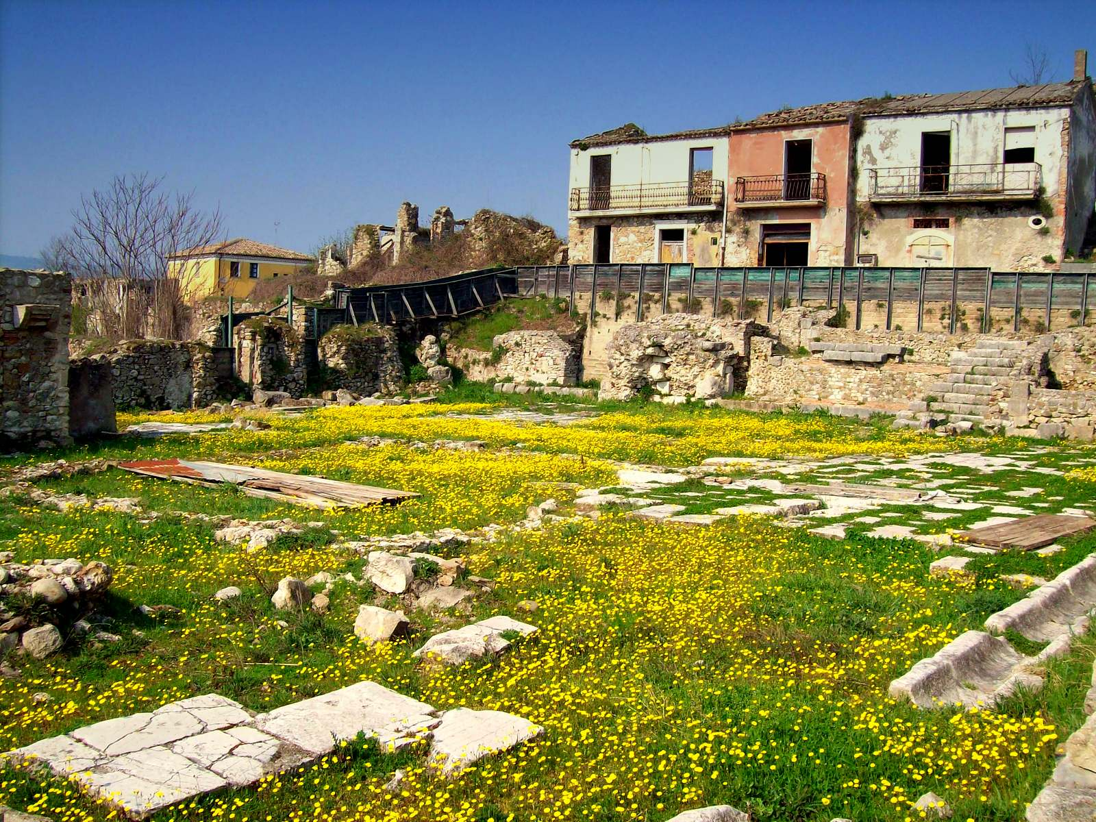 Foro romano nell'area archeologica di Compsa (Conza i fiori di campo investono di caldo giallo i grigi basamenti dell'antico anfiteatro This is a photo of a monument which is part of cultural heritage of Italy.